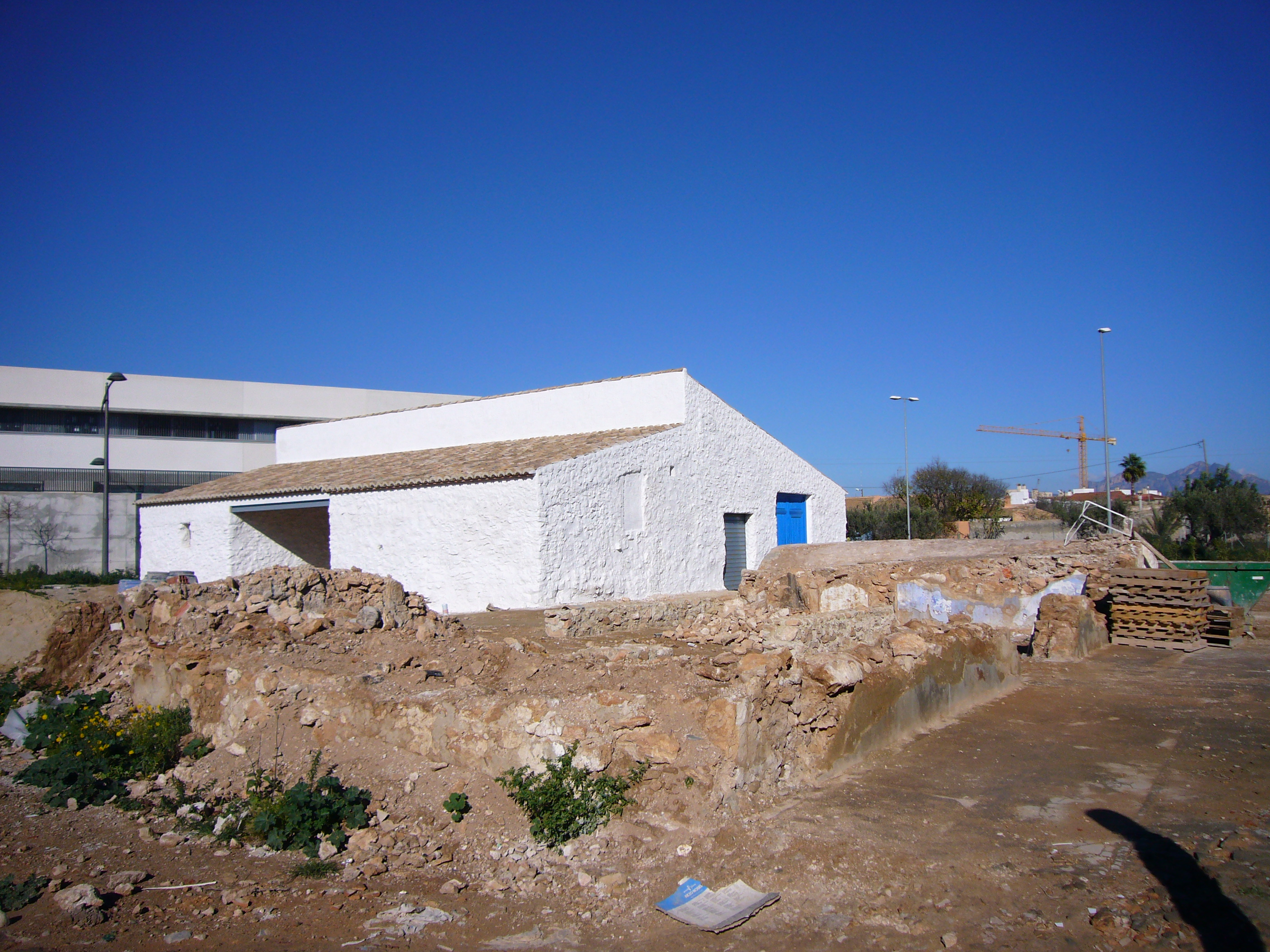 Casa de volta de La Almazara en San Vicente del Raspeig (Alicante).